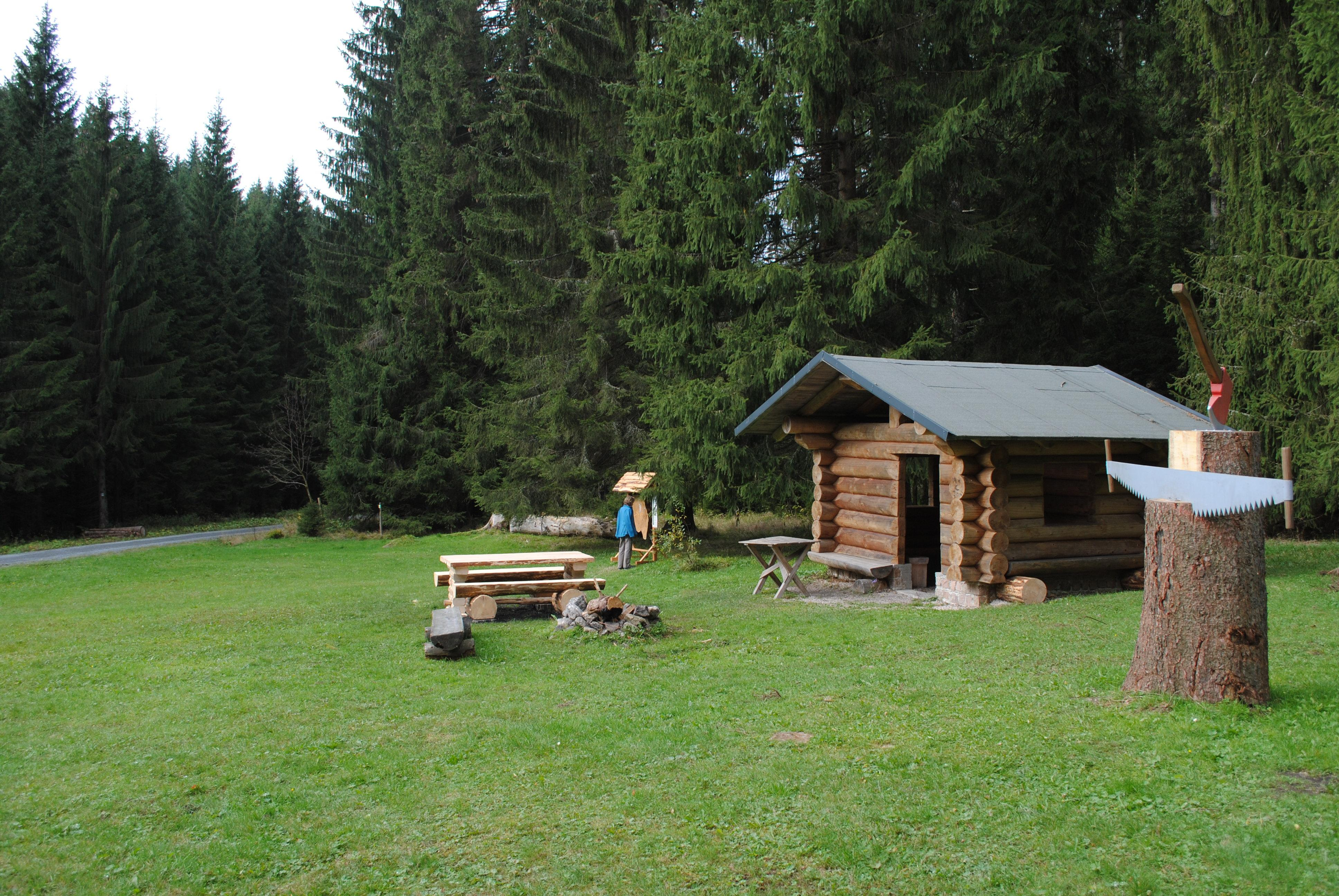 Lichtung Dreibächel mit Baumdenkmal